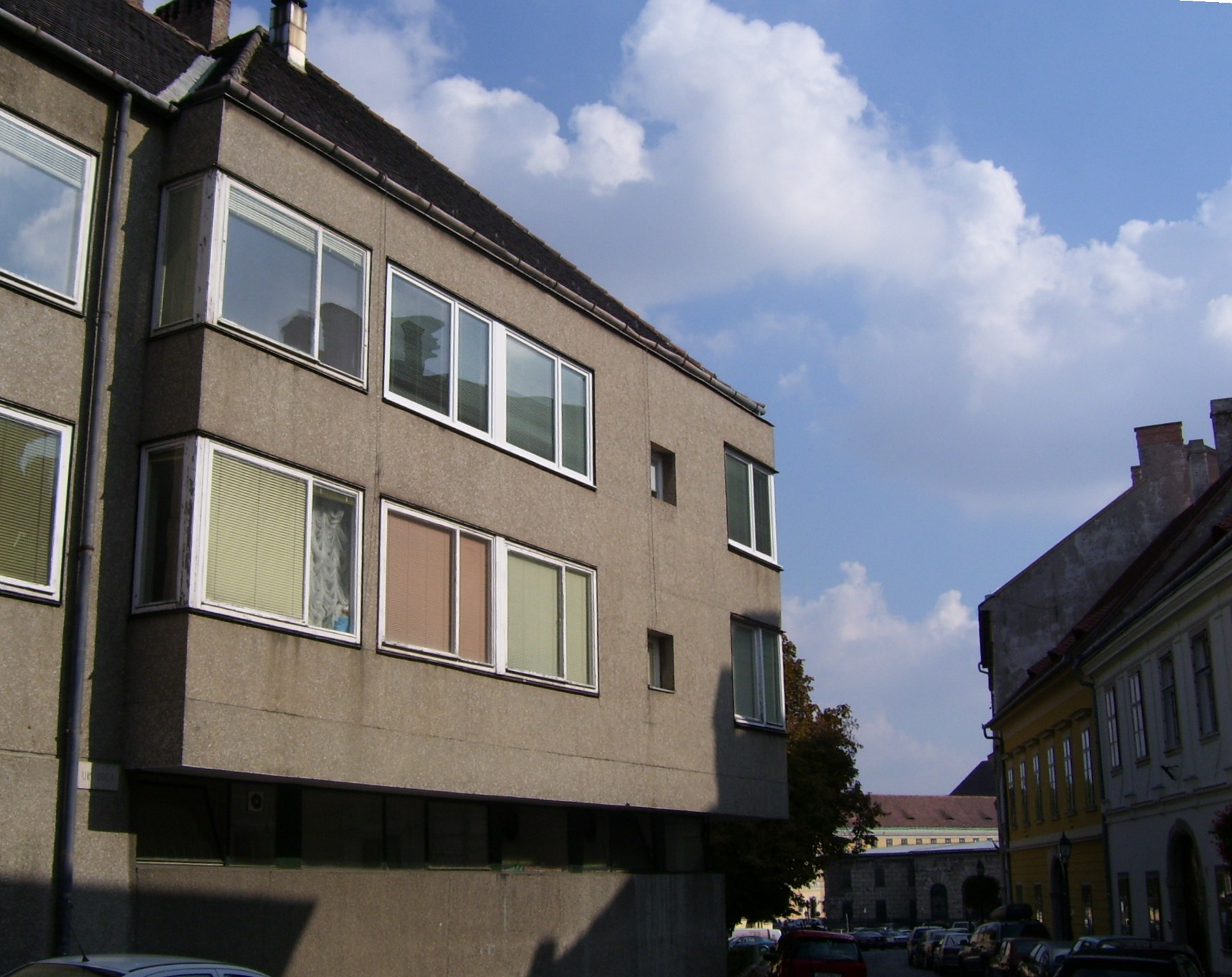 Budapest, I. Dísz tér 8 lakóház. Tervező: Farkasdy Zoltán és Kenessey Attila